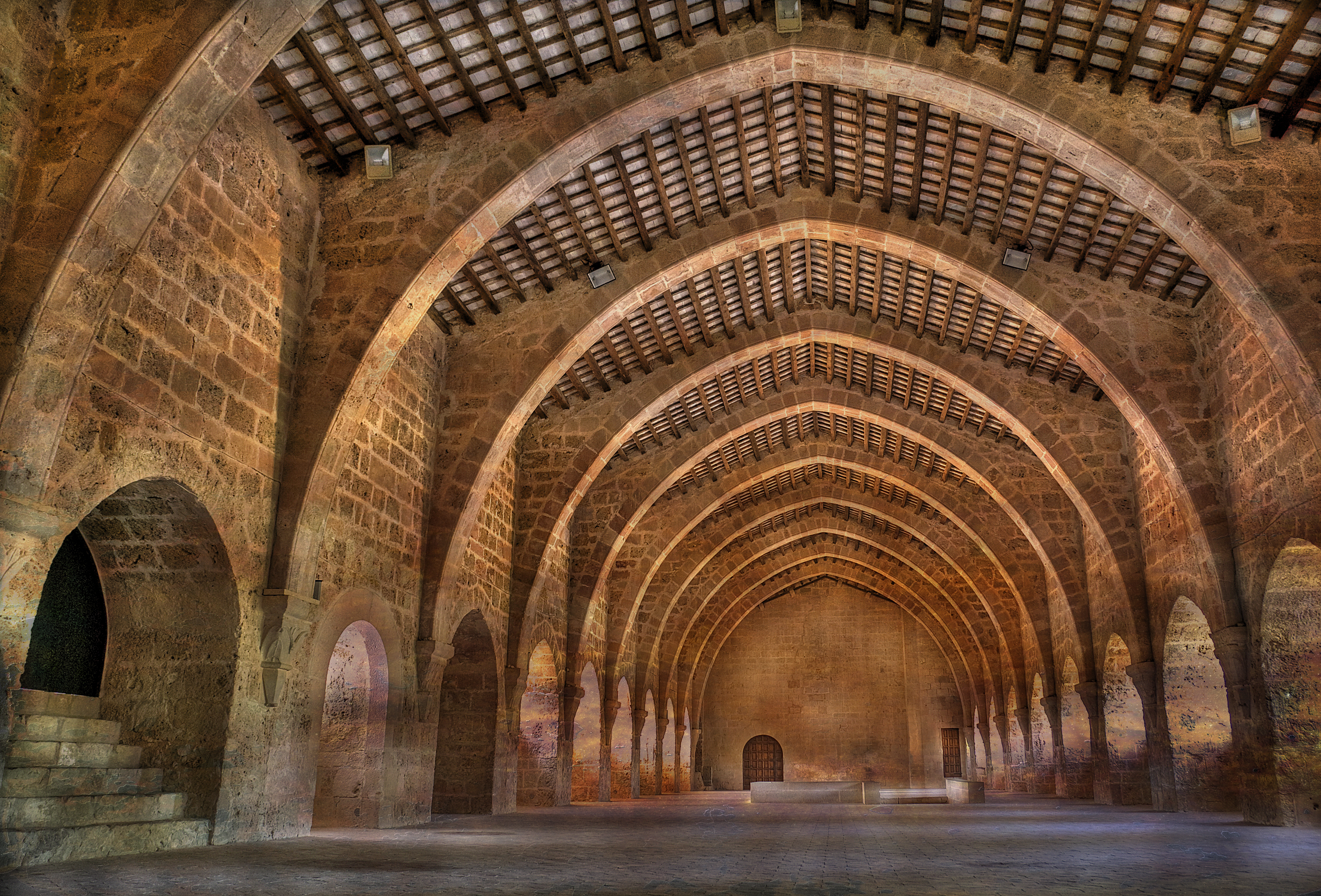 Santes Creus- Dormitori Dels Monges.